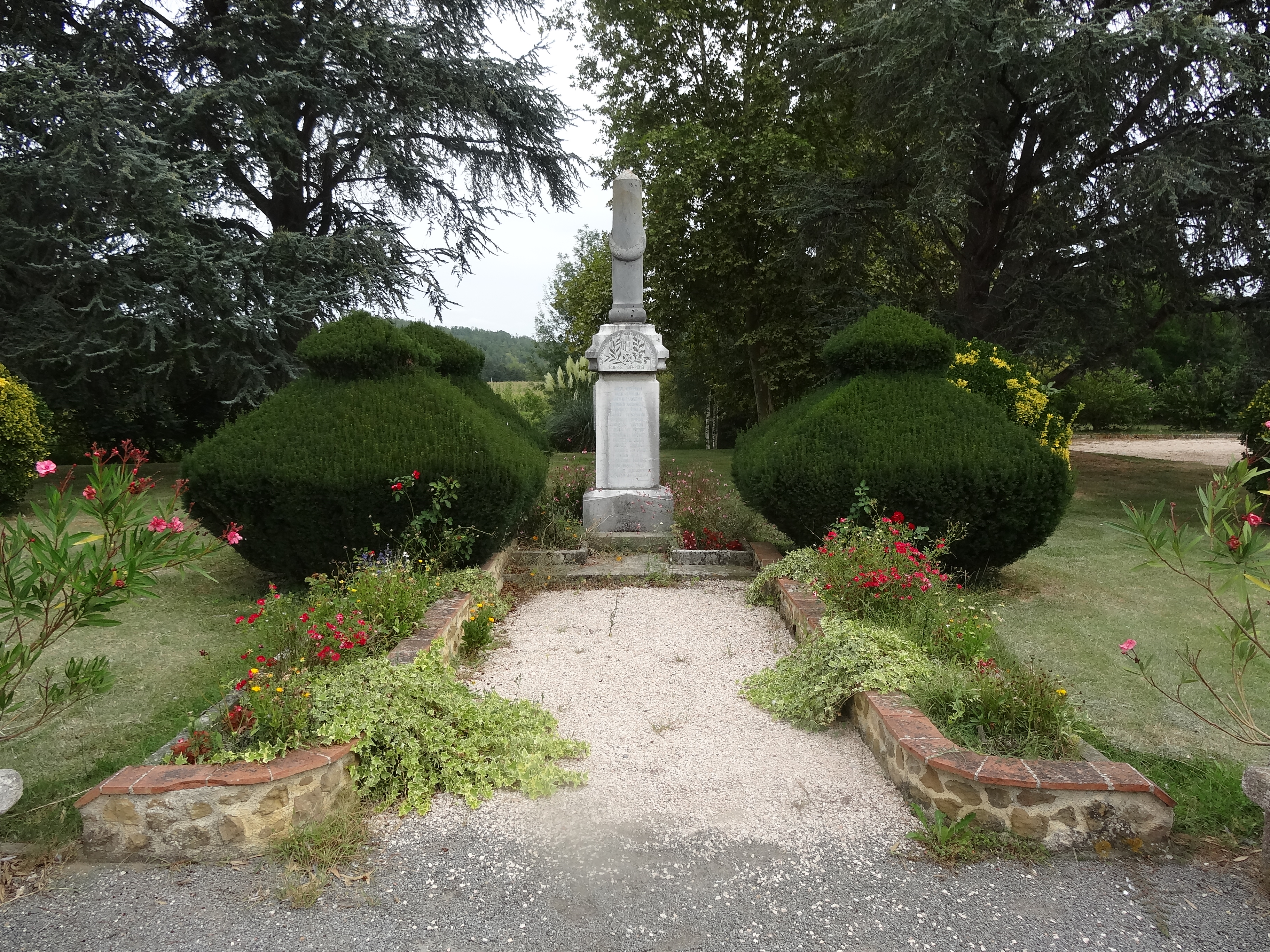 Monument aux morts de Saint-Michel dans le Gers.